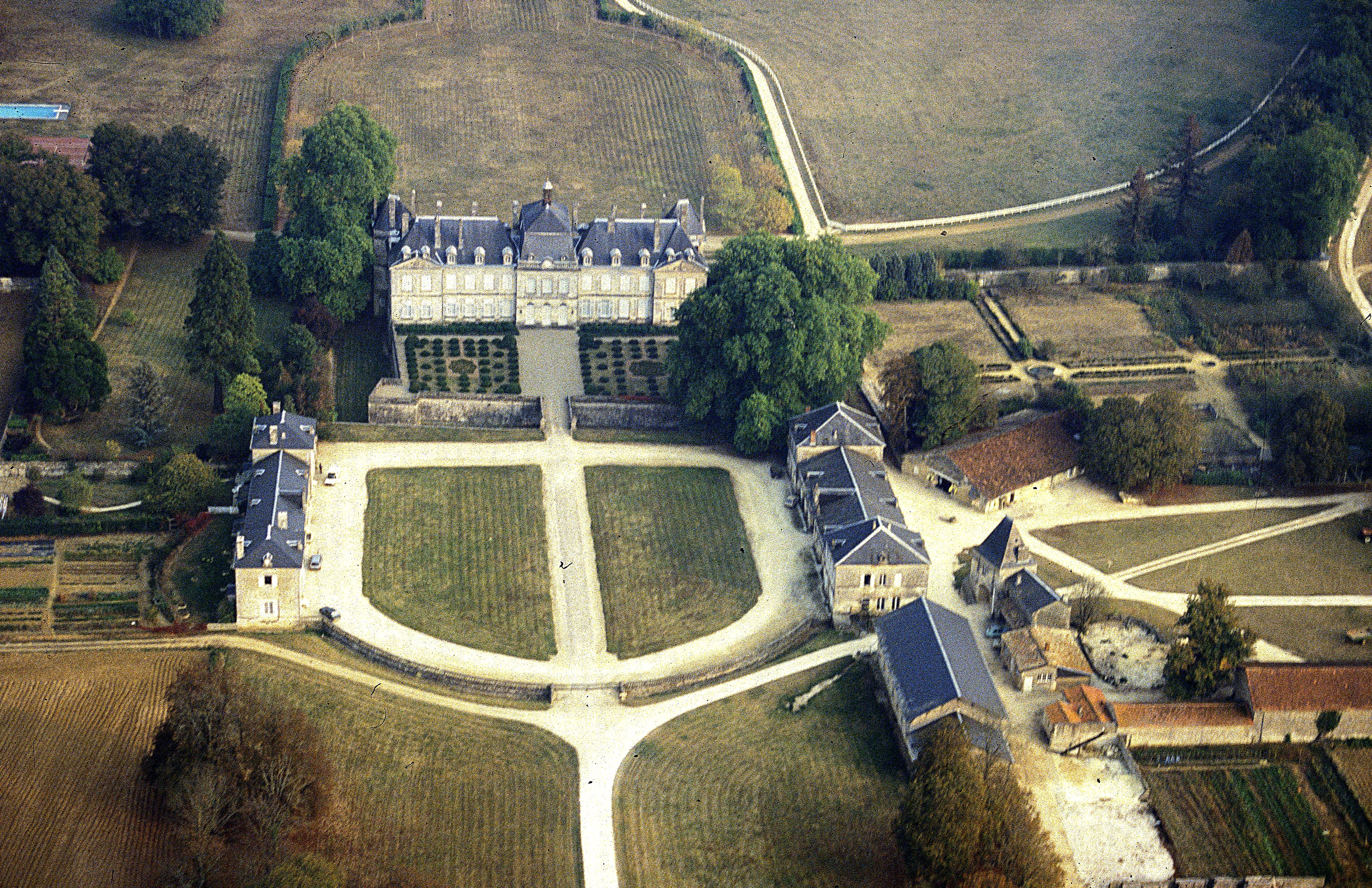 PLASSAC. Château attesté dès le 14ème.Reconstruit au 16èùe, sa forme actuelle dâte du 18ème siècle. Forte activité touristique. .